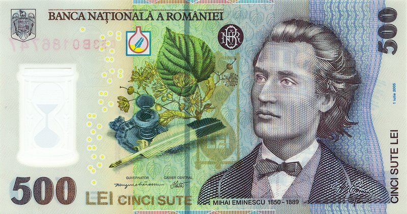 500 Leu anverse